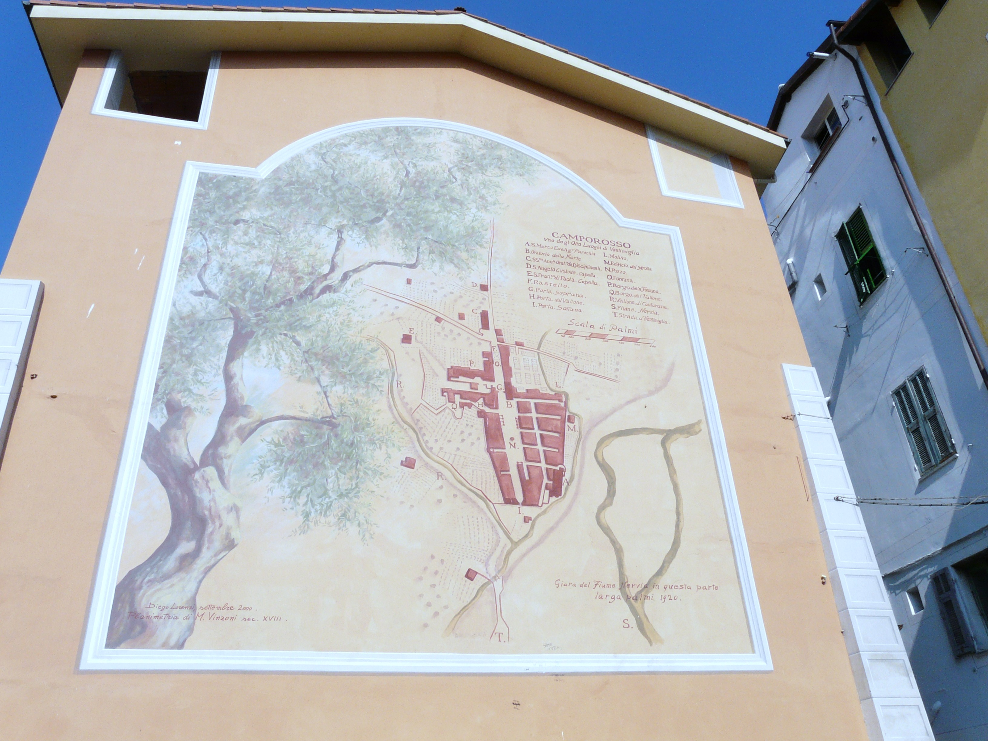 Mappa del comune su una casa di Camporosso, Liguria, Italia